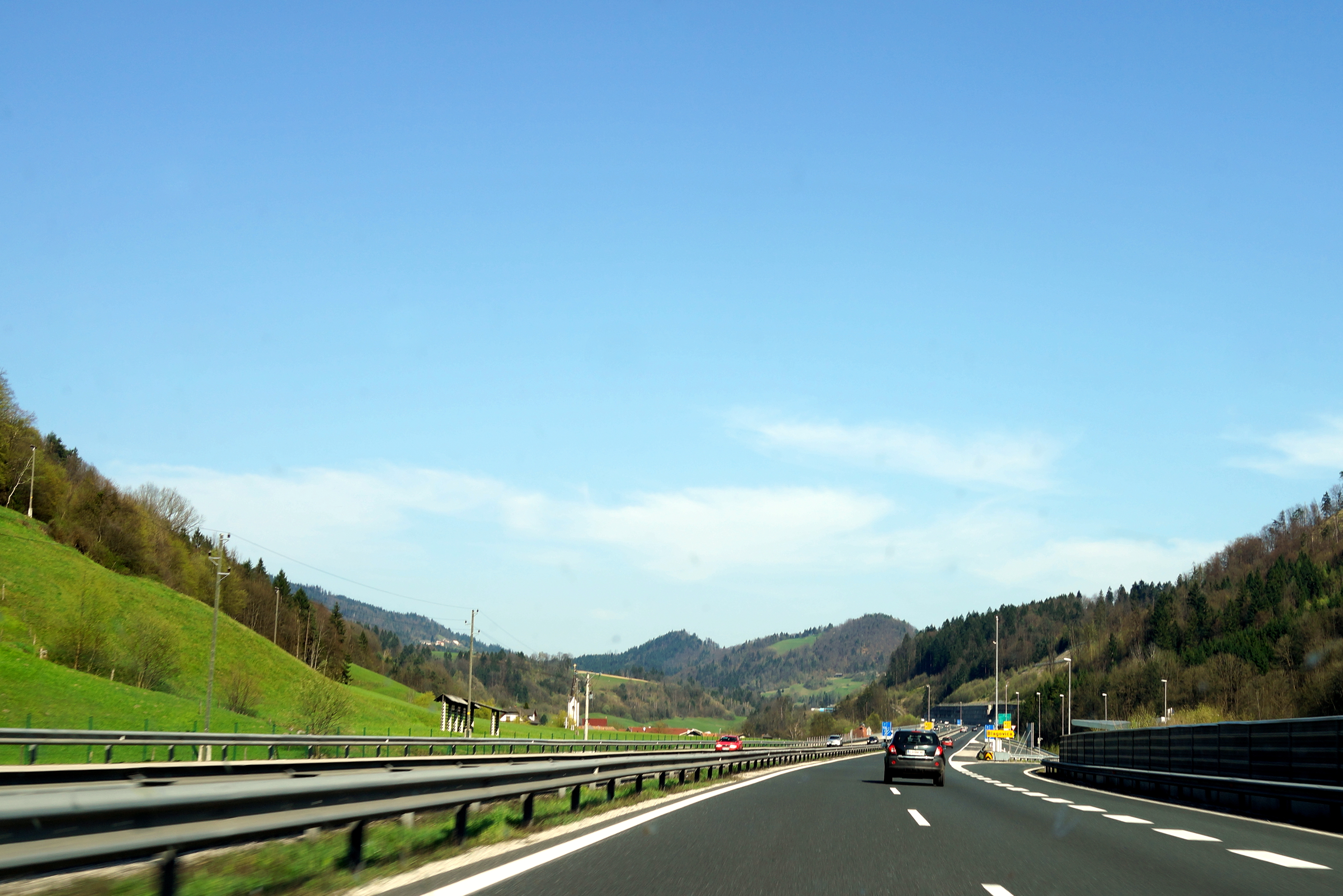 Piran Slo